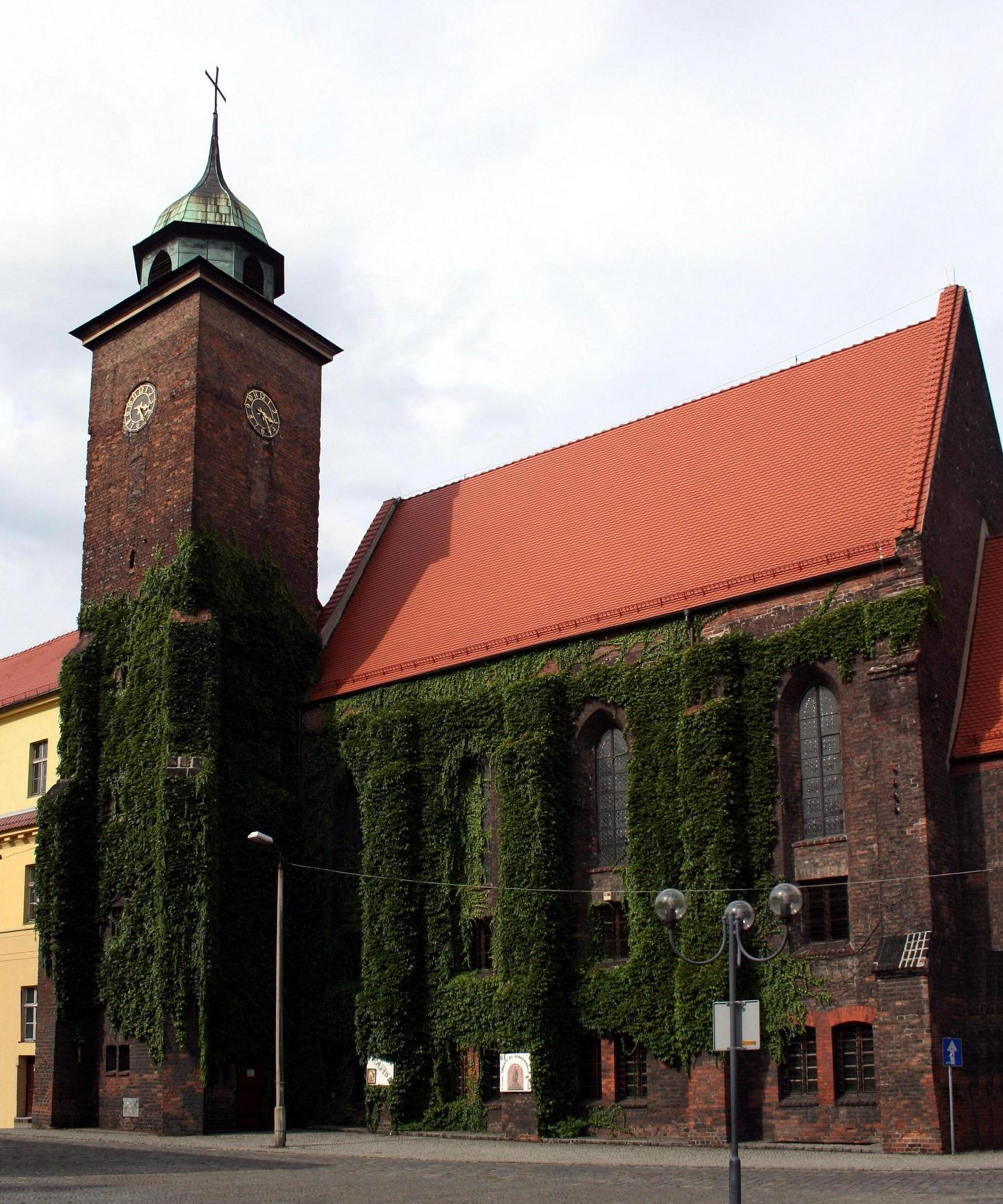 Klasztorny_kościół_Dominikanek w Raciborzu, obecnie zaadoptowany dla potrzeb muzeum